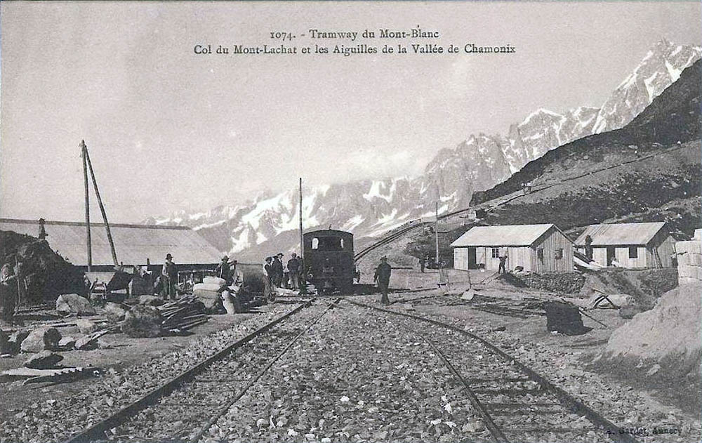 Tramway du Mont-Blanc - Col du Mont-Lachat et les aiguilles de la vallée de Chamonix.